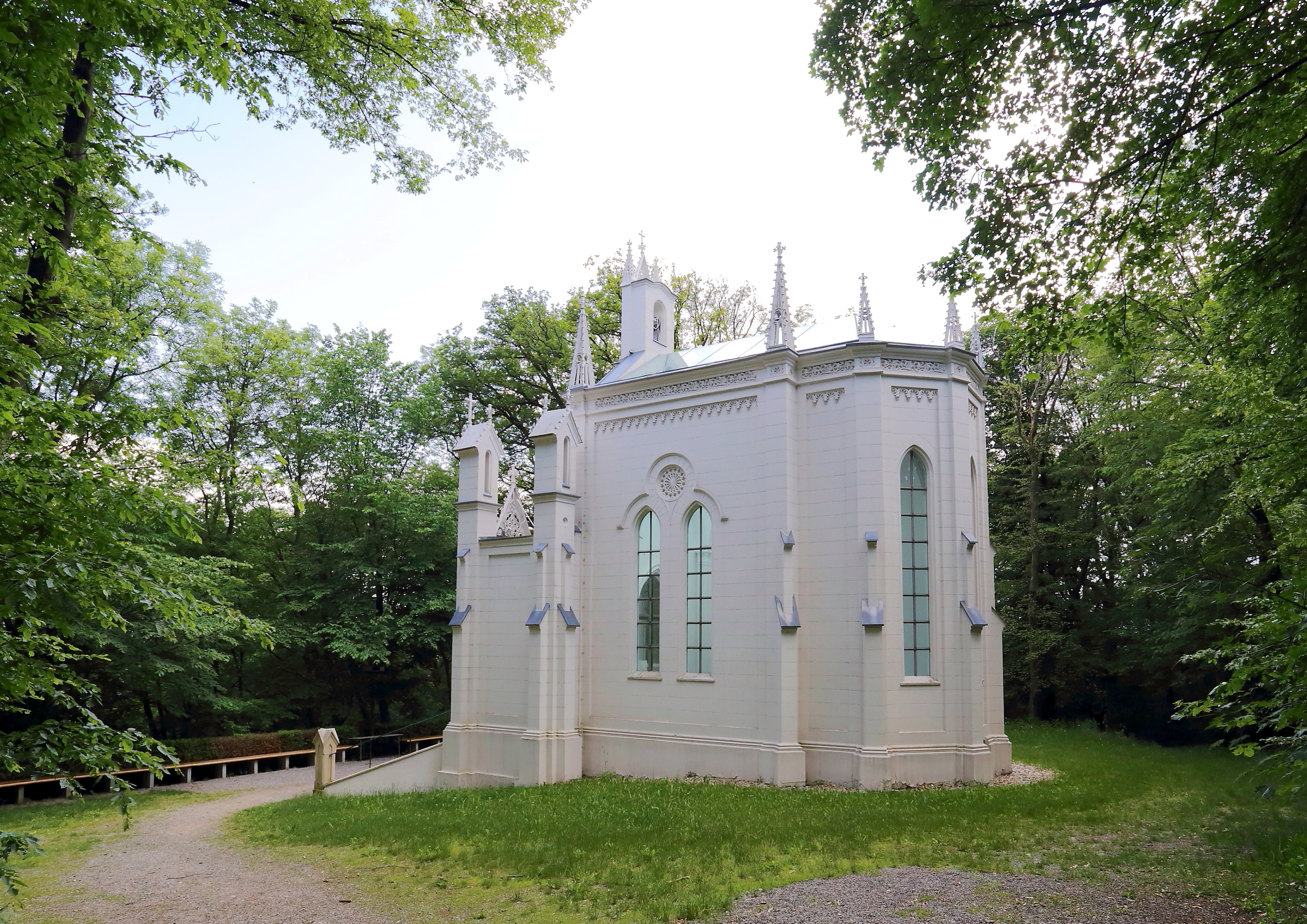 Nordostansicht der Kapelle hl. Elisabeth am Himmel, auch Sis(s)i-Kapelle bezeichnet, im Wiener Gemeindebezirk Döbling. Die neogotische Kapelle wurde anlässlich der Vermählung des Kaiserpaares in den Jahren 1854 bis 1856 errichtet. Im Zweiten Weltkrieg wurde die Kapelle stark beschädigt, danach dem Verfall preisgegeben und Mitte der 2000er Jahre wiederinstandgesetzt bzw. renoviert.